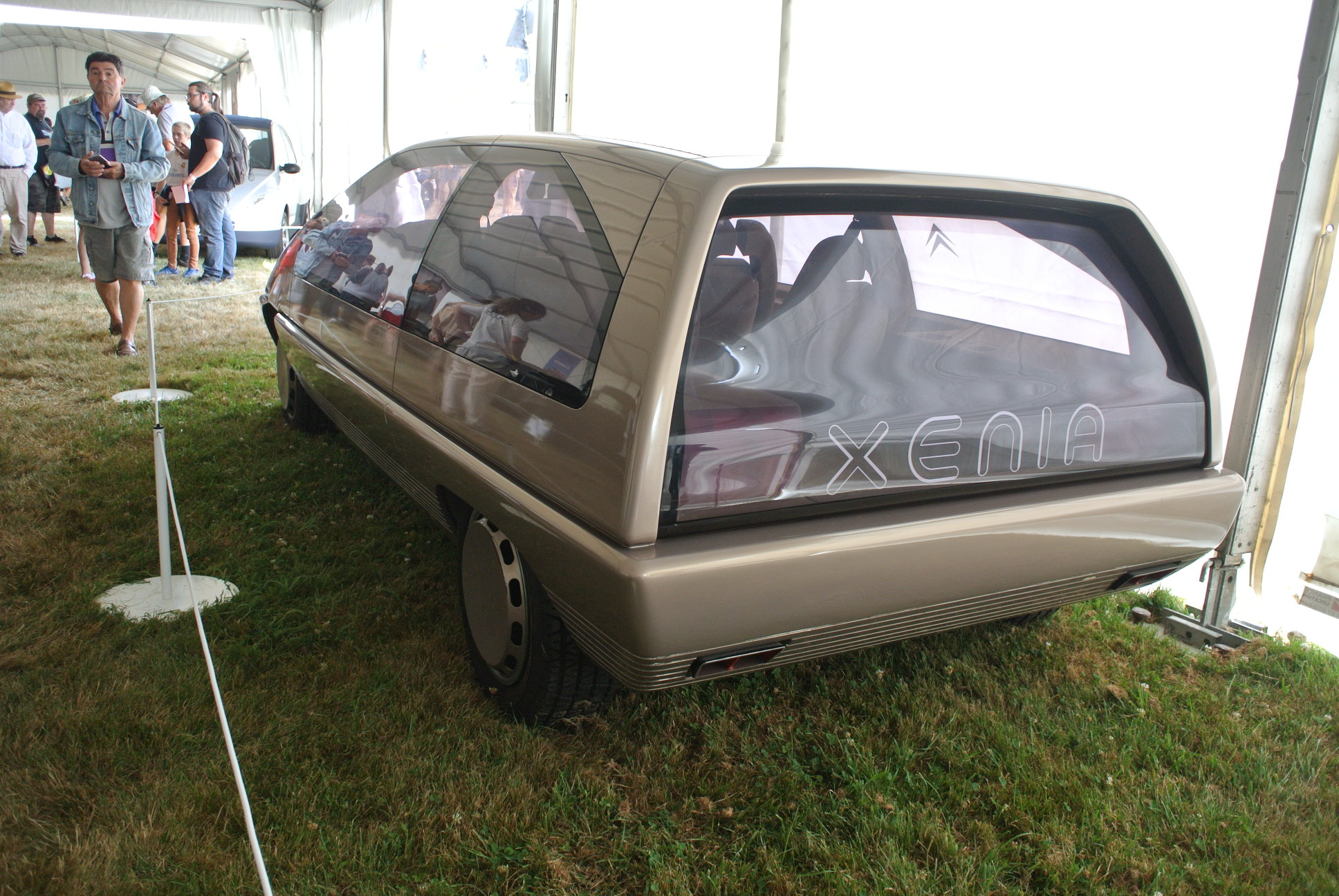 Vue arrière